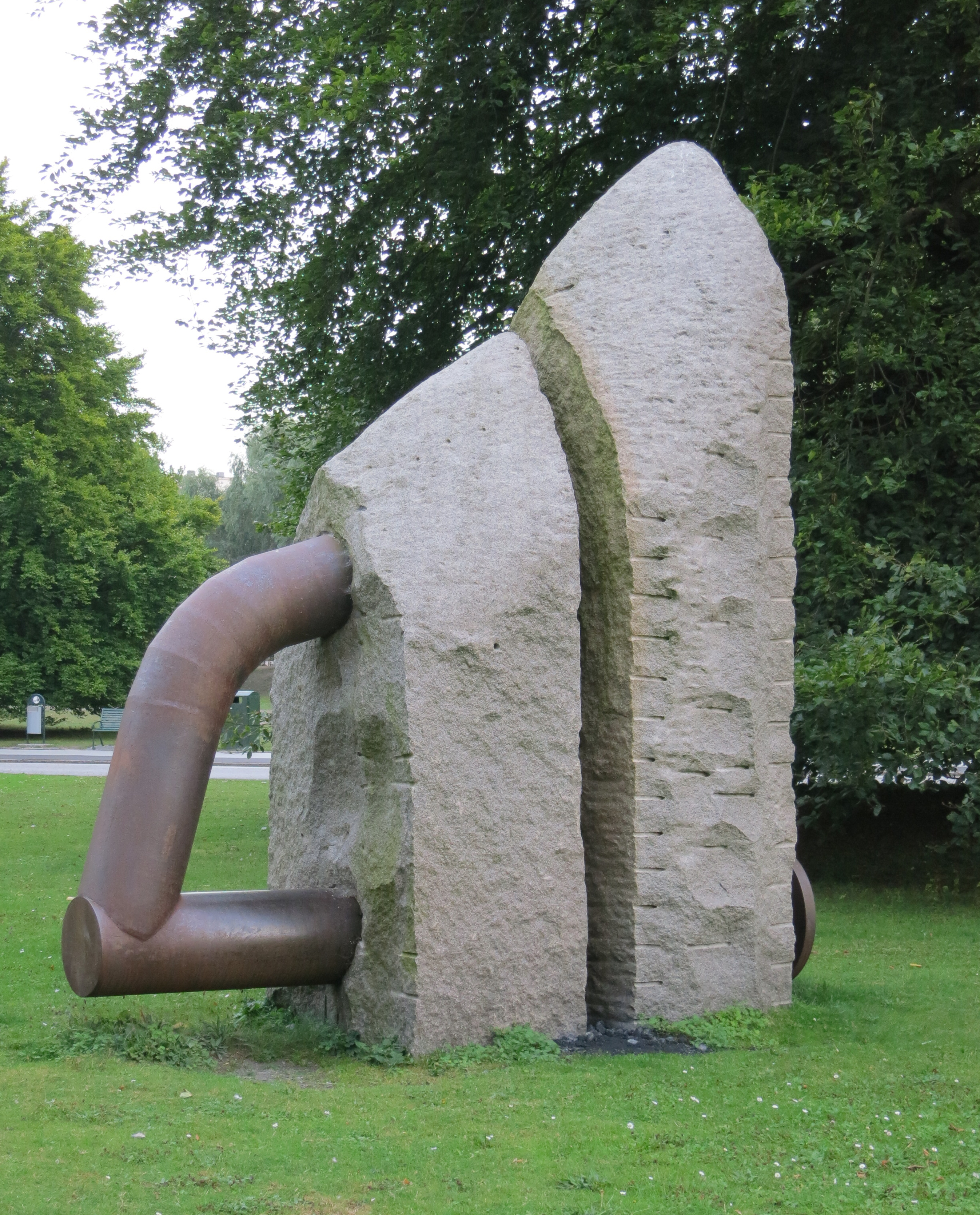 Skulptur i Pildammsparken i Malmö